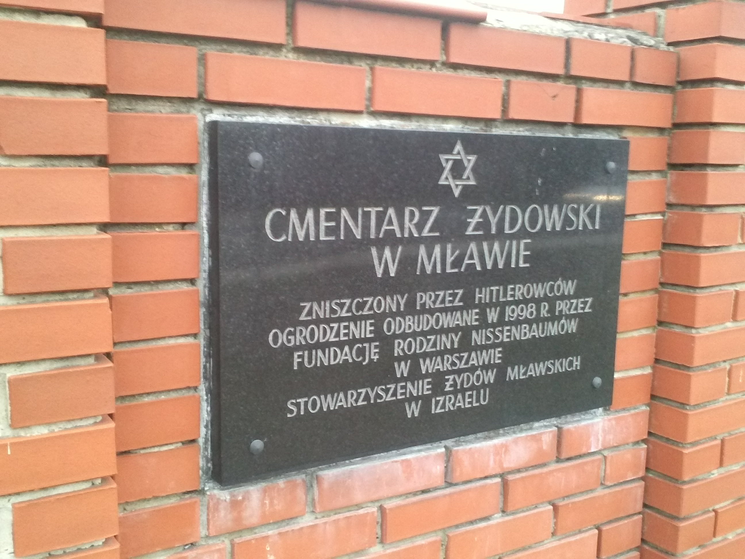 Tablica przy bramie głównej cmentarza.